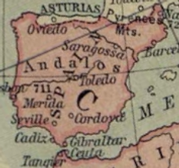 España el año 750